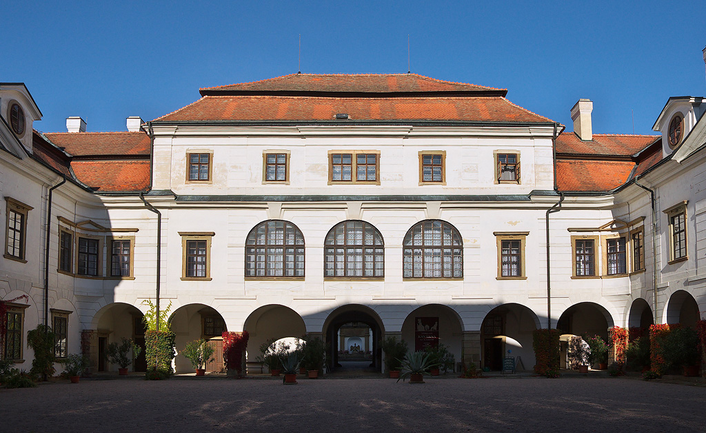 Rychnov nad Kněžnou, zámecké nádvoří